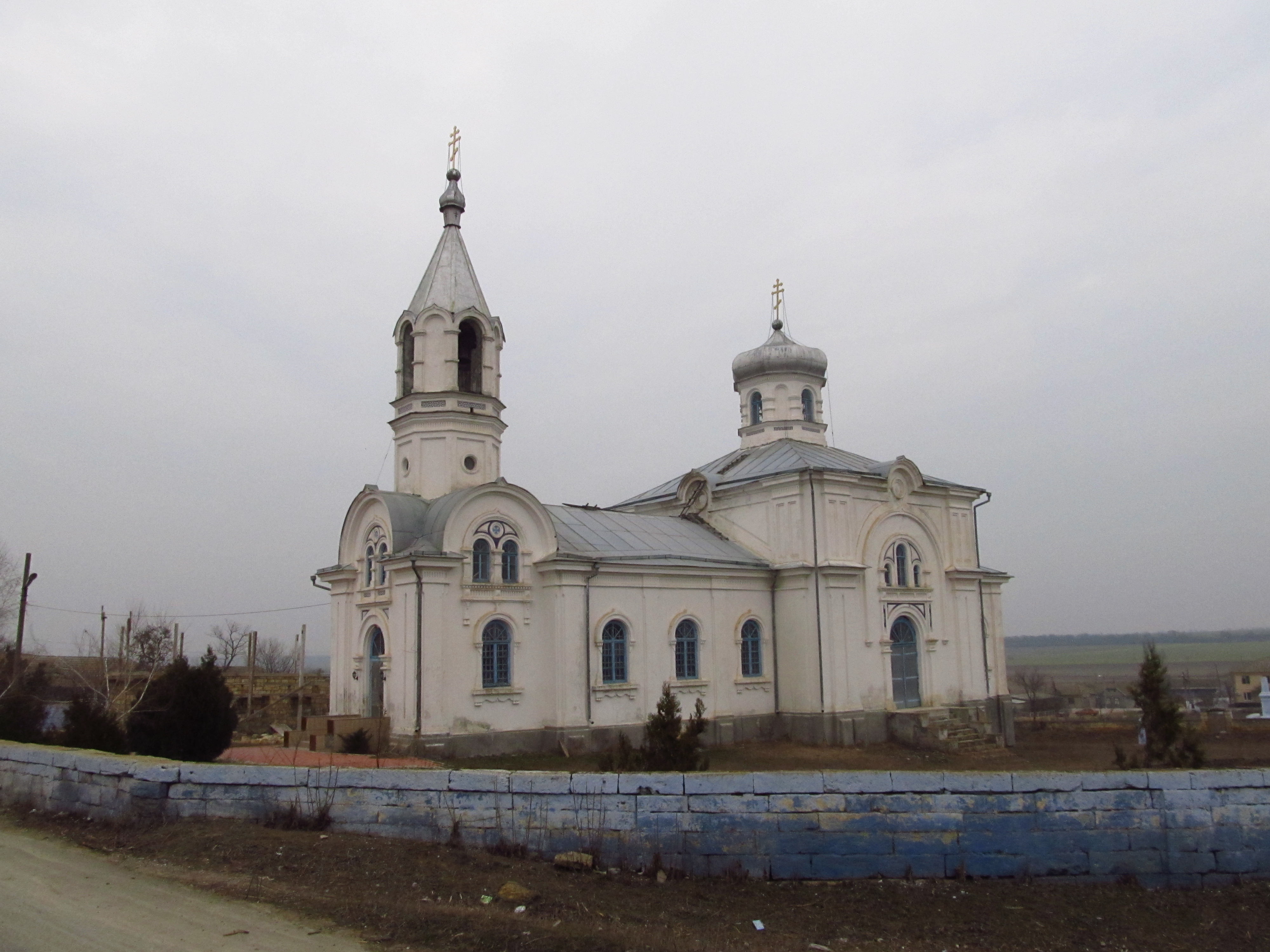 с. Острівне, 1891 р.